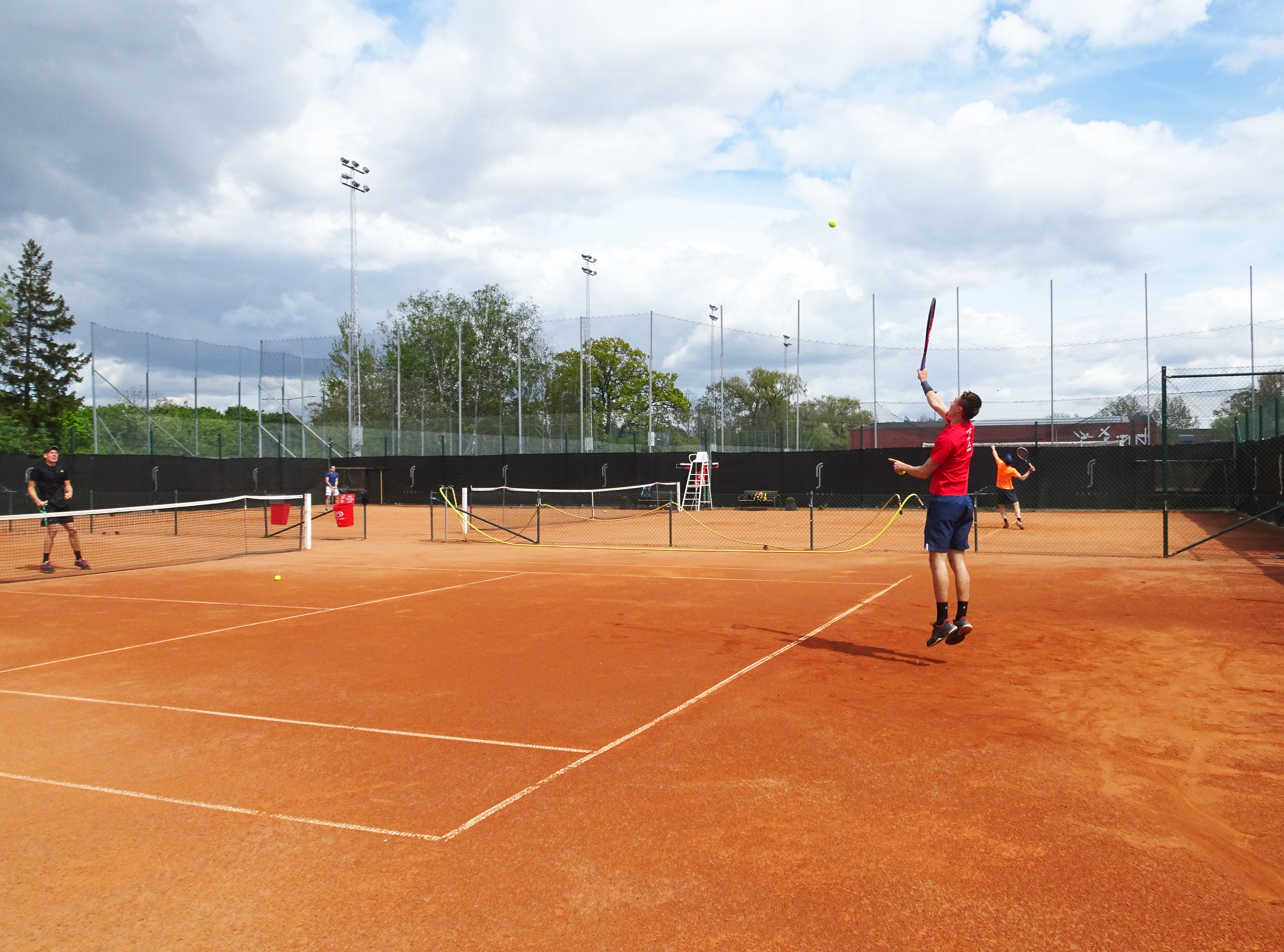 Mälarhöjdens idrottsplats, tennisplats